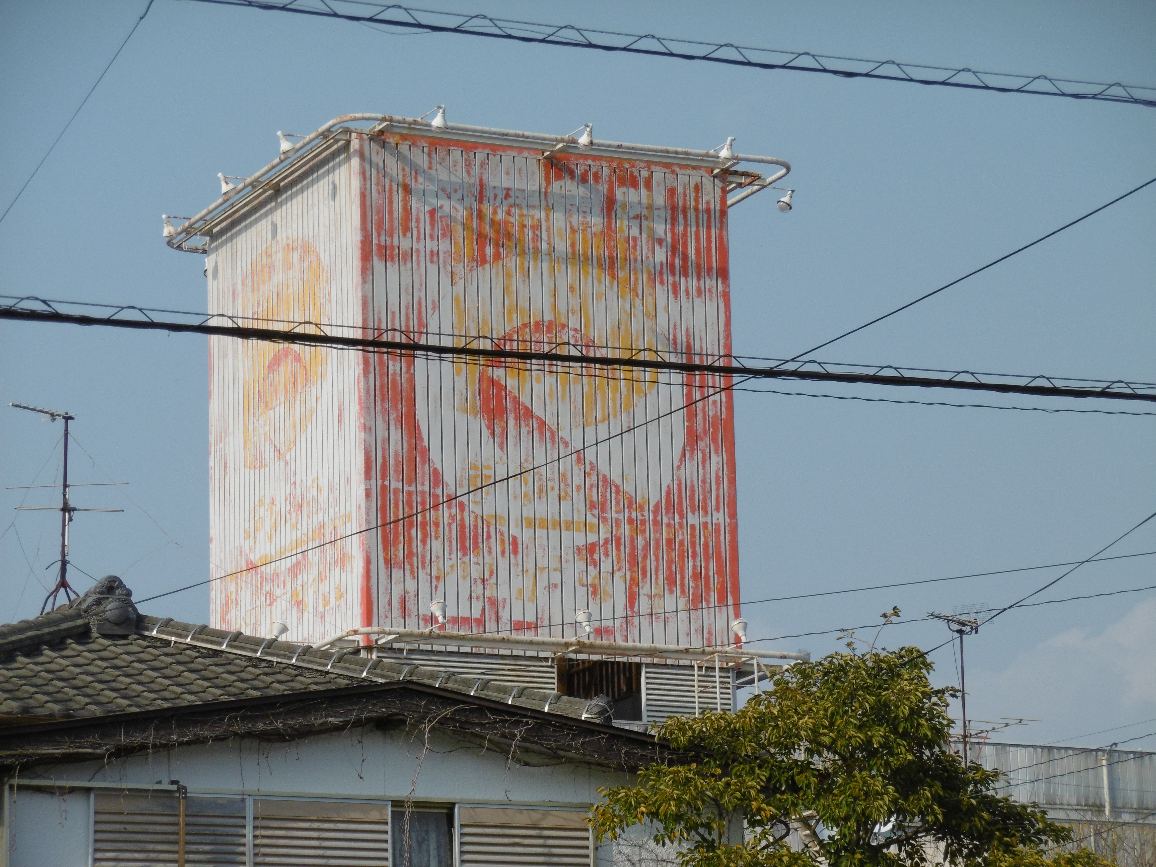 ご近所の風景ですが、このエイコーのマークの権利はダイナマイトコーポレーション社が有しています。